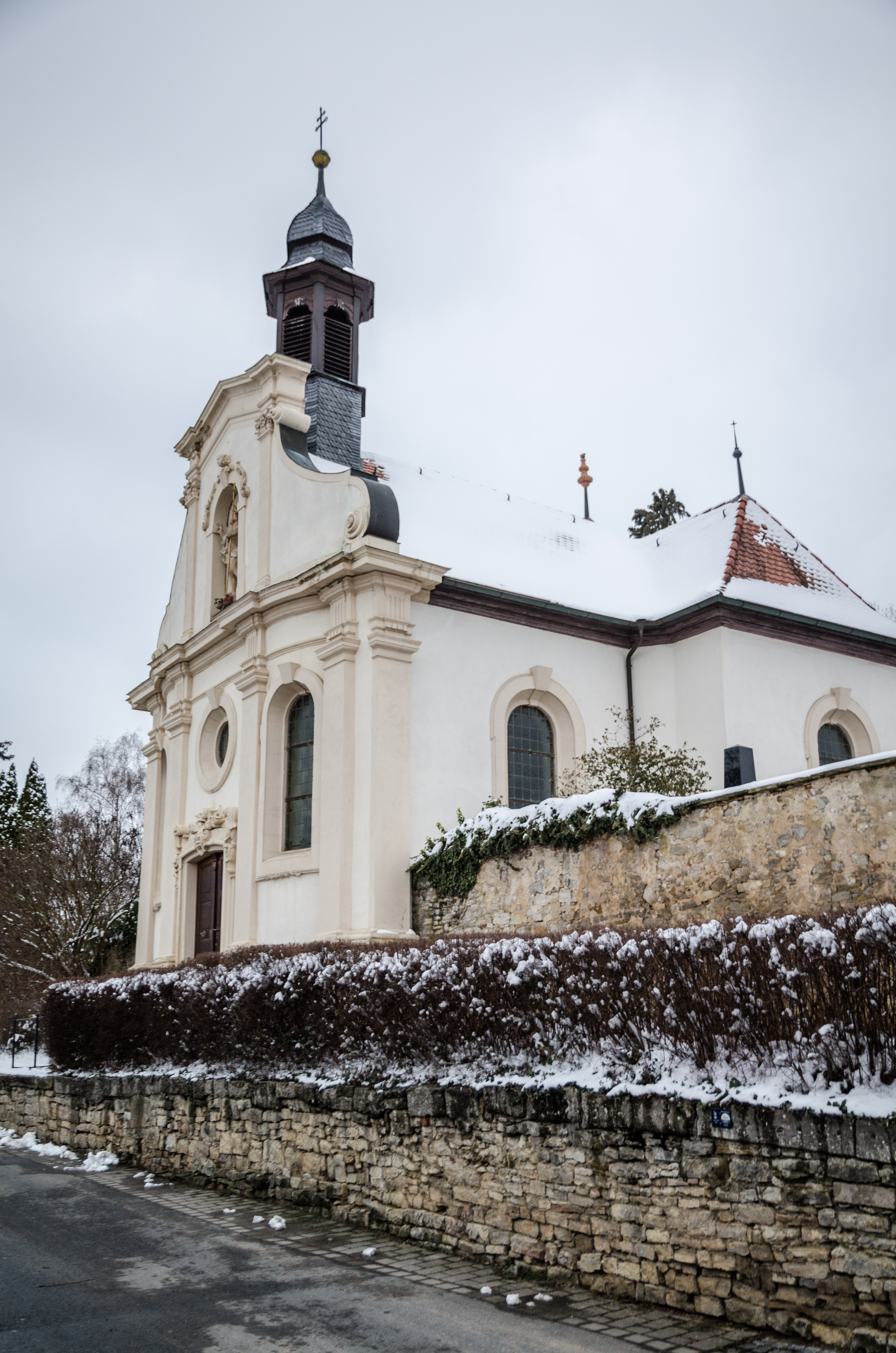 Sulzfeld, Friedhofskapelle Heilig Kreuz